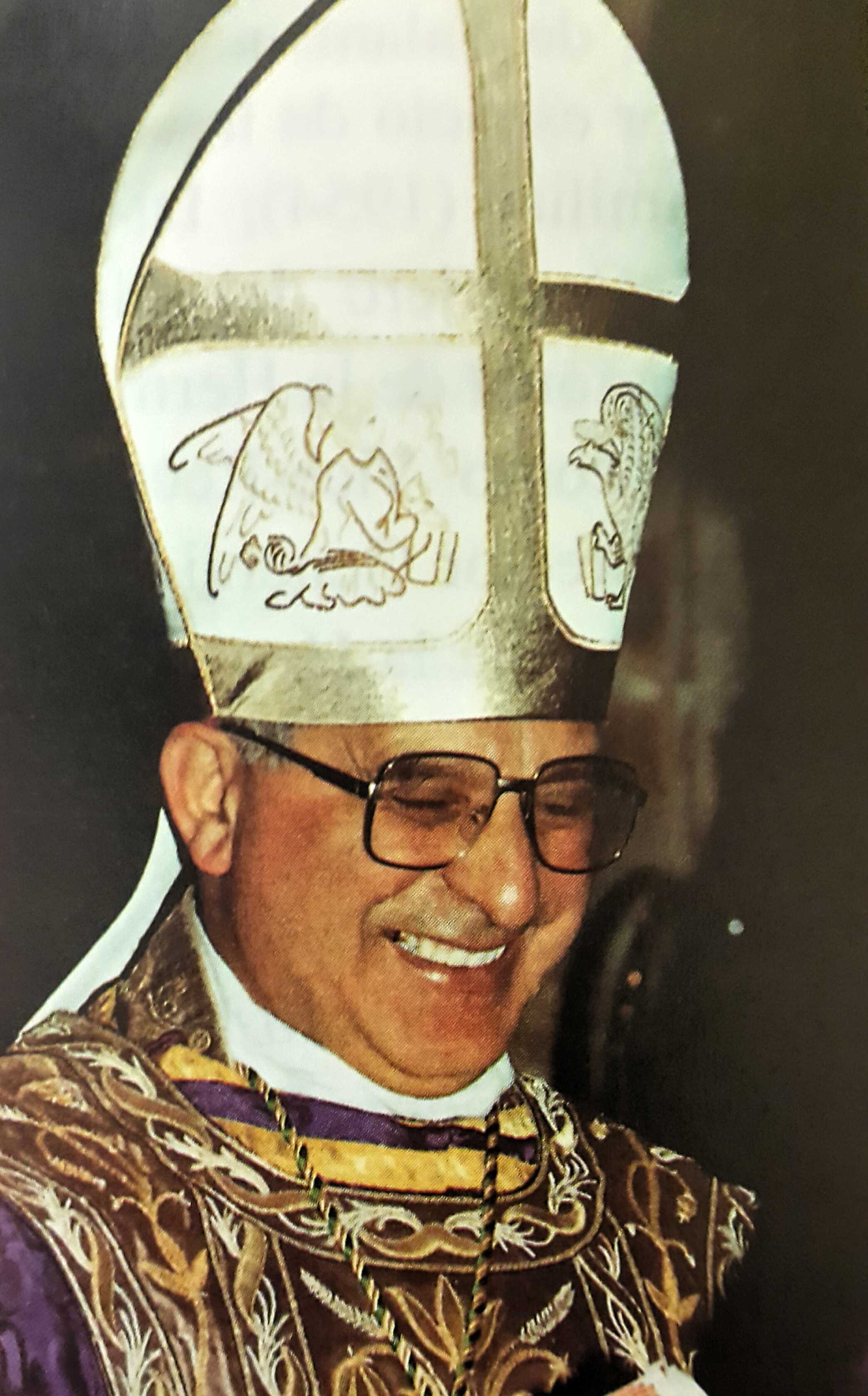 Santiago Martínez Acebes. Obispo de Plasencia. Arzobispo de Burgos. Inauguración iglesia parroquial del Beato Rafael. Burgos 1997.